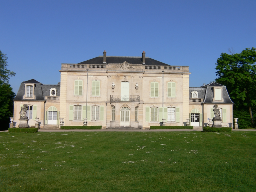 Château de Montaigu, Jarville-la-Malgrange, Lorraine, France